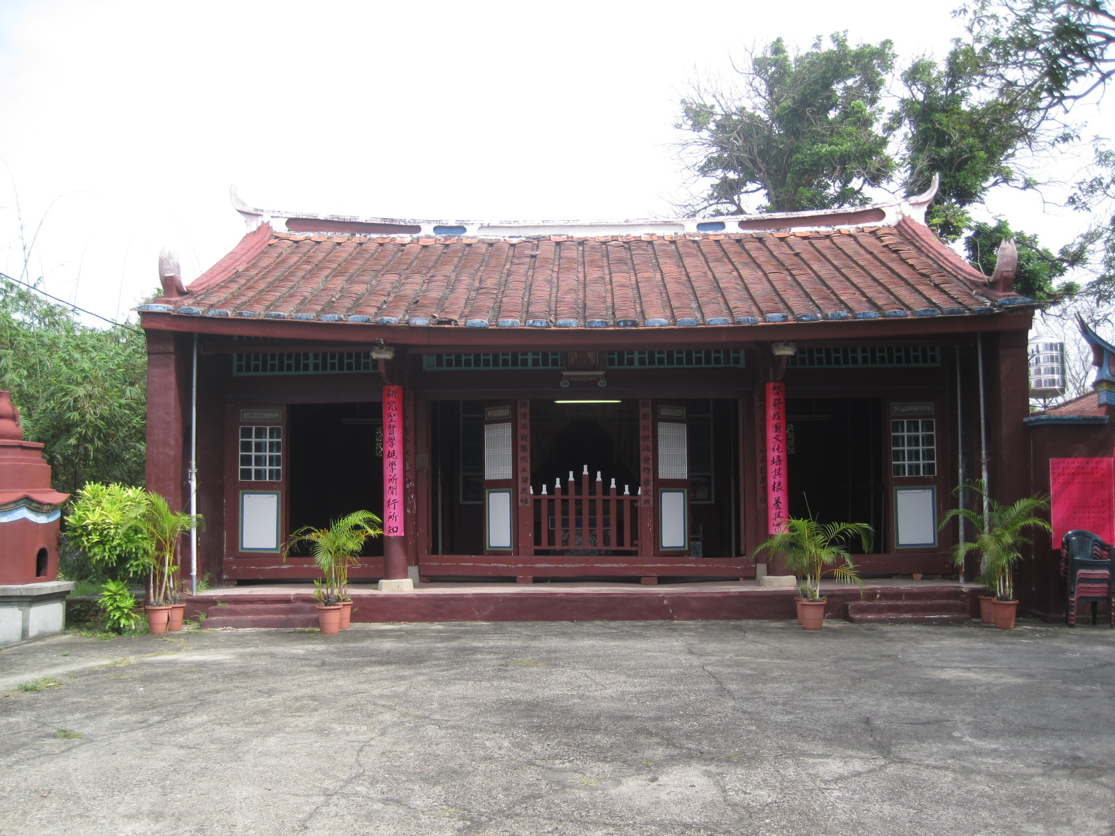 歸仁敦源聖廟